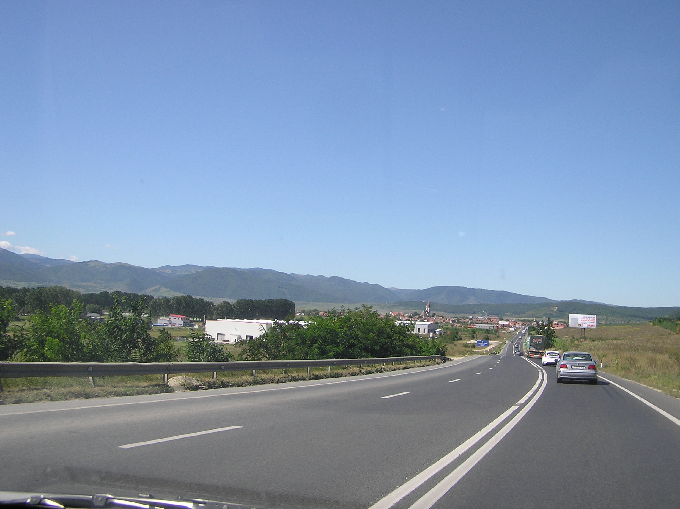 Die Europastraße 68/81 bei Cristian / Grossau, Siebenbürgen, Rumänien.